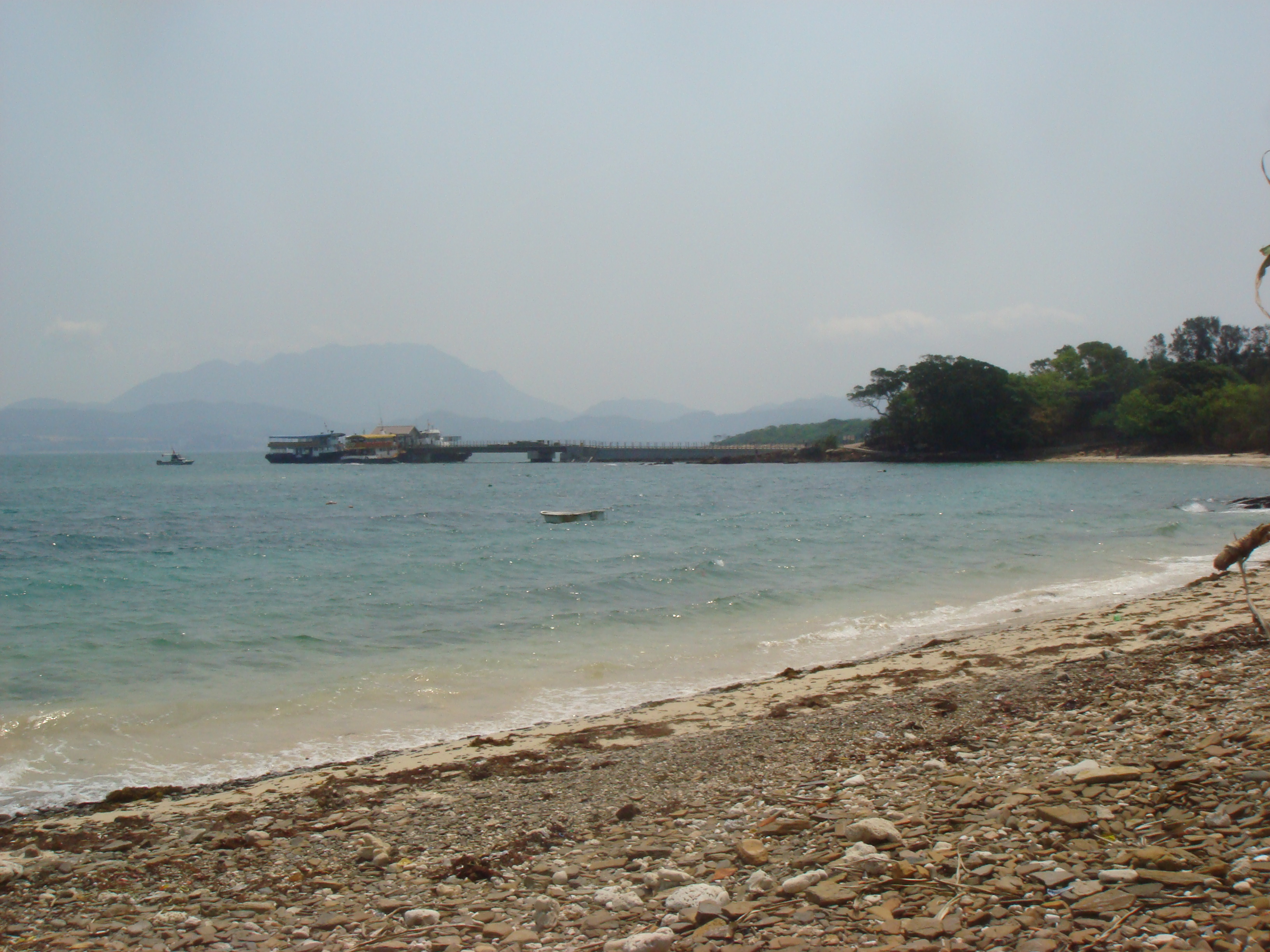 Tung Ping Chau, Hong Kong